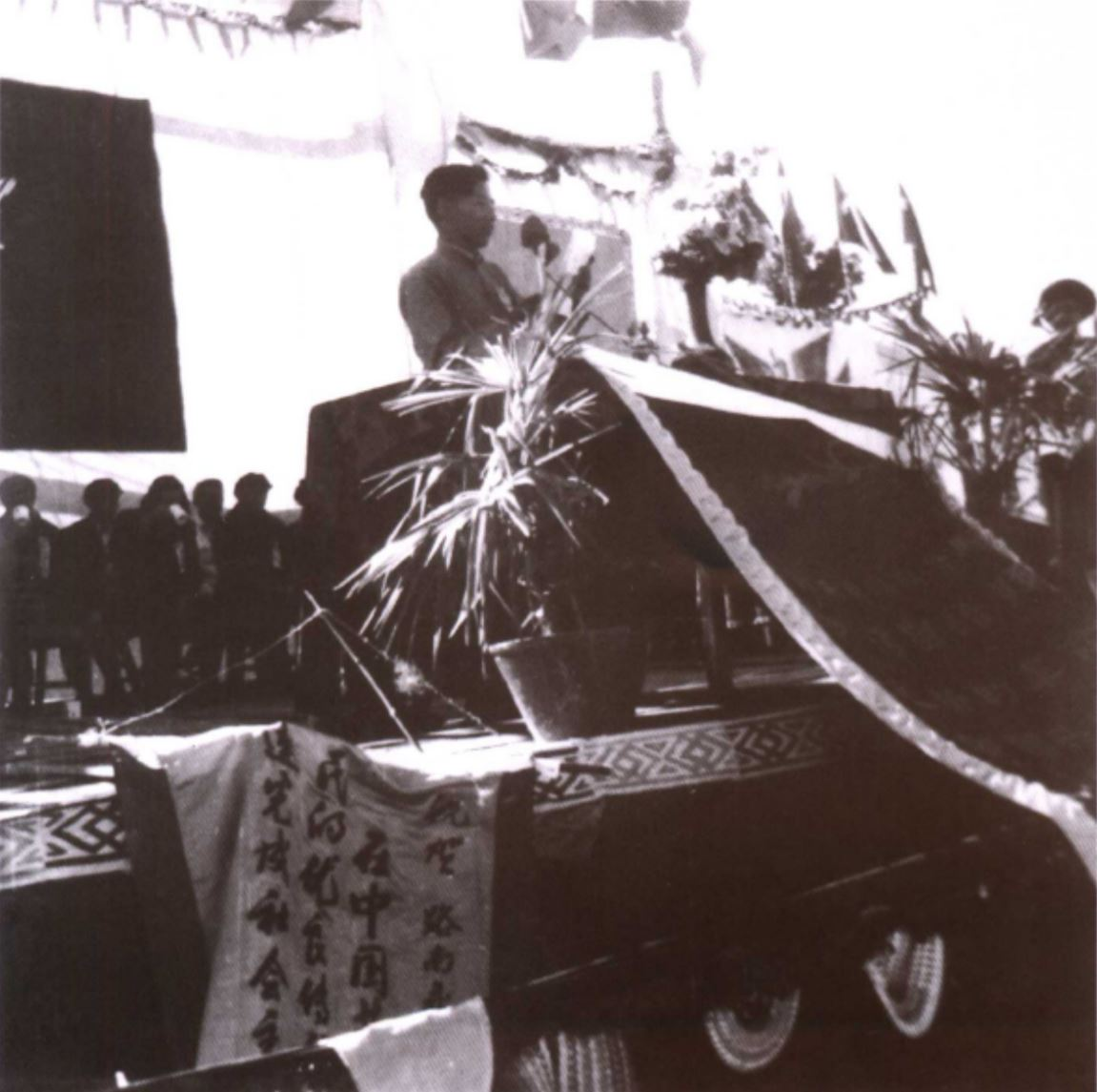 中文（中国大陆）: 1956年路南县长毕有森在自治县成立大会上讲话